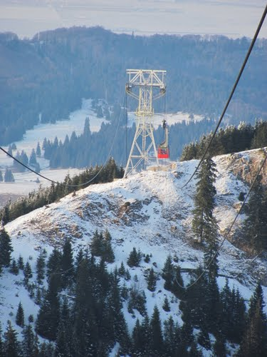 Telecabina Capra Neagra-Febr 2011